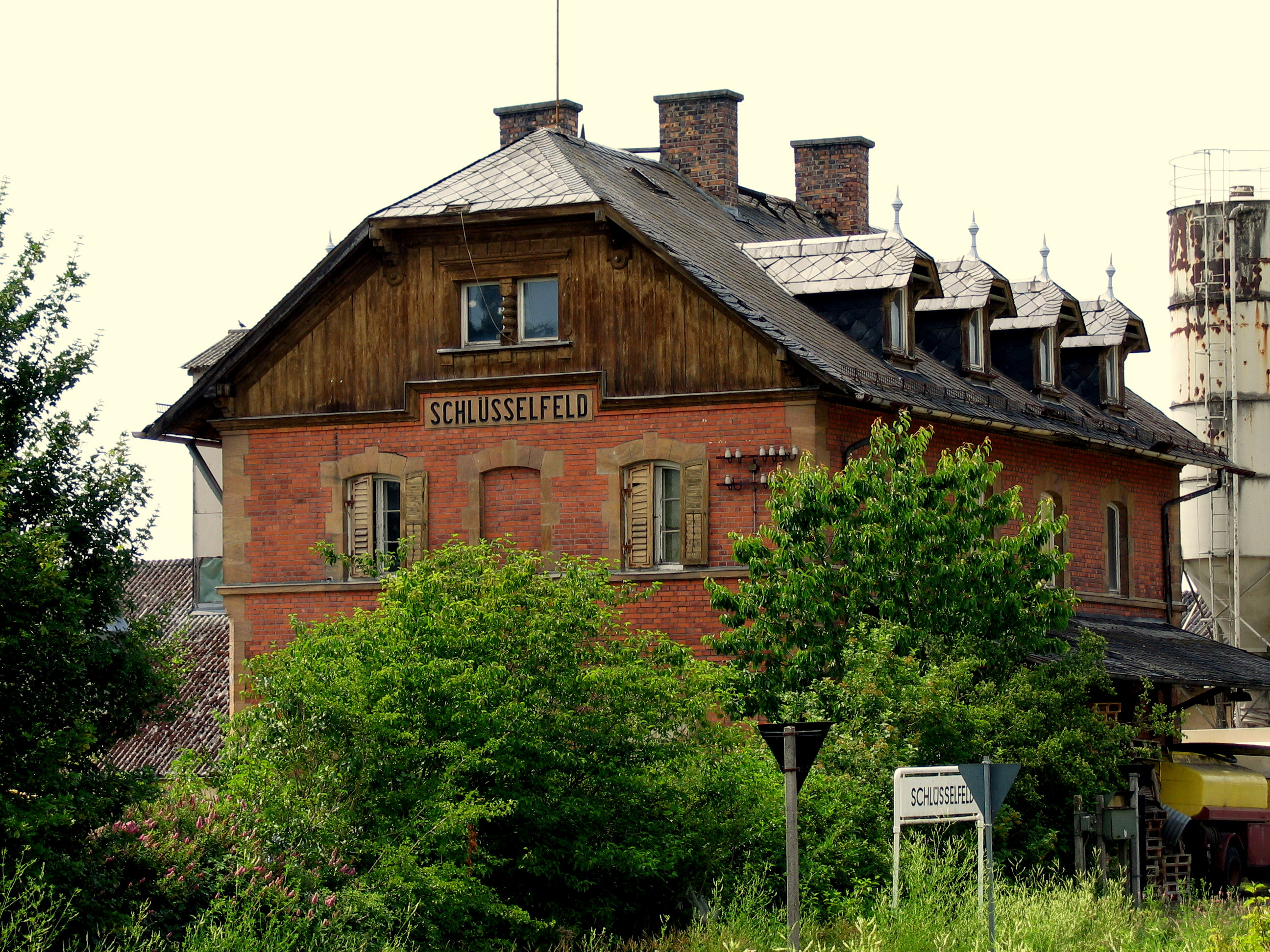 Schlüsselfeld (Lkr. Bamberg, Oberfranken): Ehemaliger Bahnhof